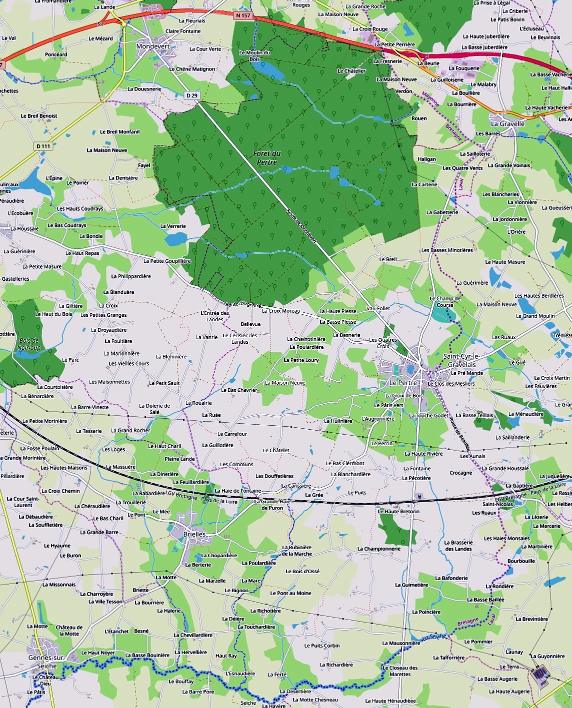 Carte de la commune du Pertre (Openstreet).